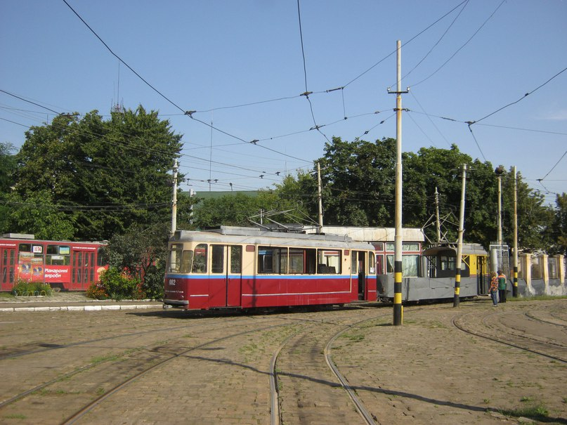 Транспортування під час капітального ремонту музейного вагону Gotha T59E №002 службовим вагоном Gotha T2-62 №001.